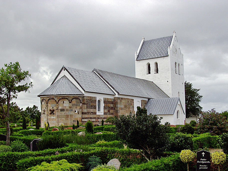 fra nordøst